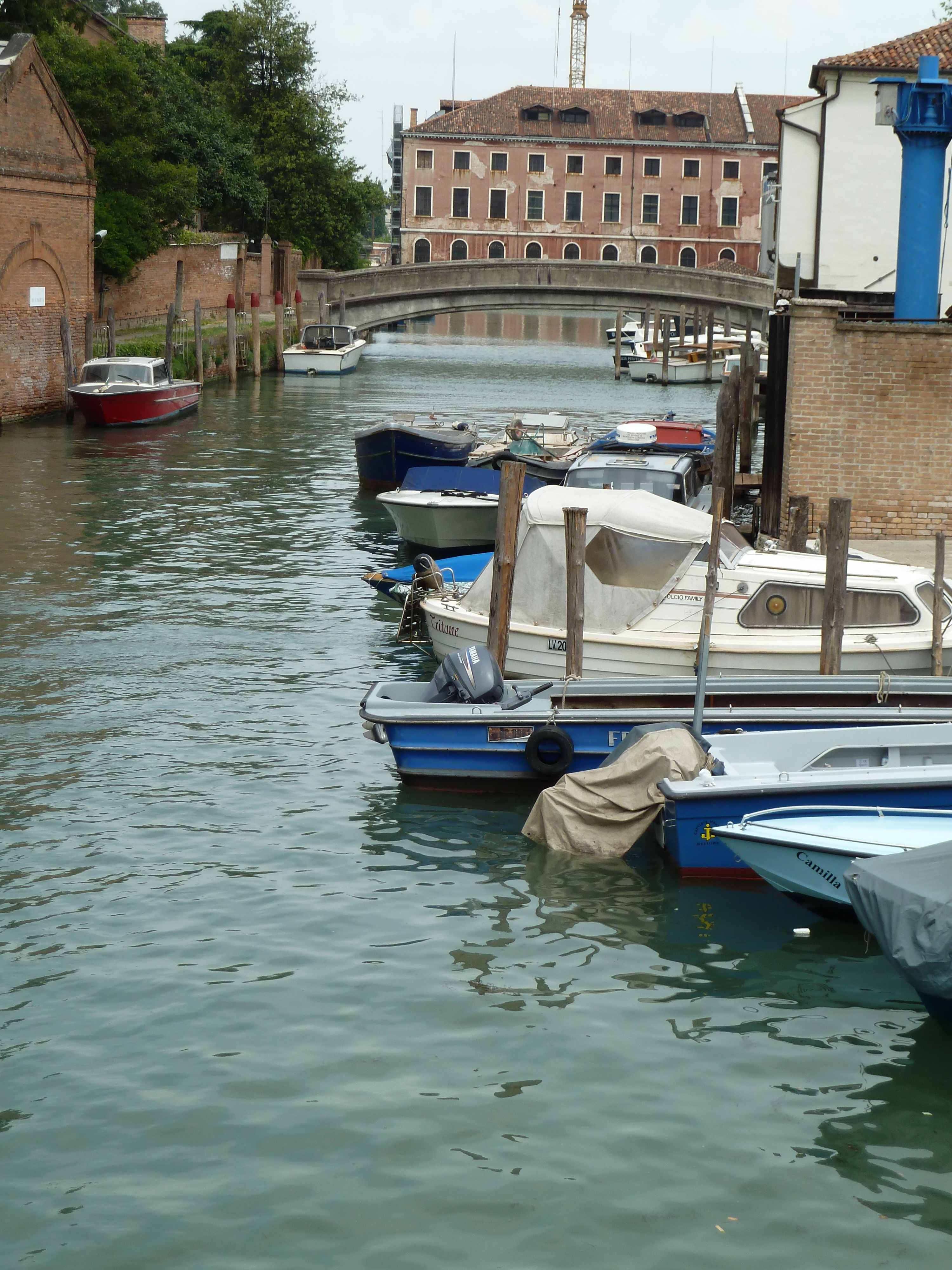 Ponte interno rio de San Marta (Venice)